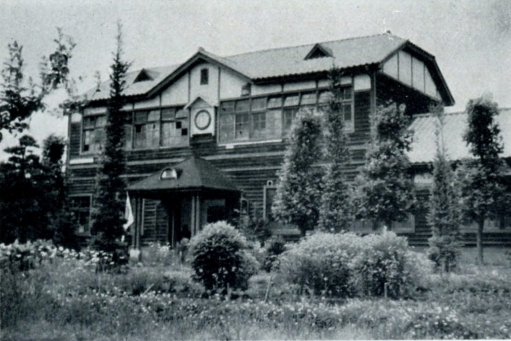 群馬県立利根農林高等学校。現在の群馬県立利根実業高等学校(群馬県沼田市)。